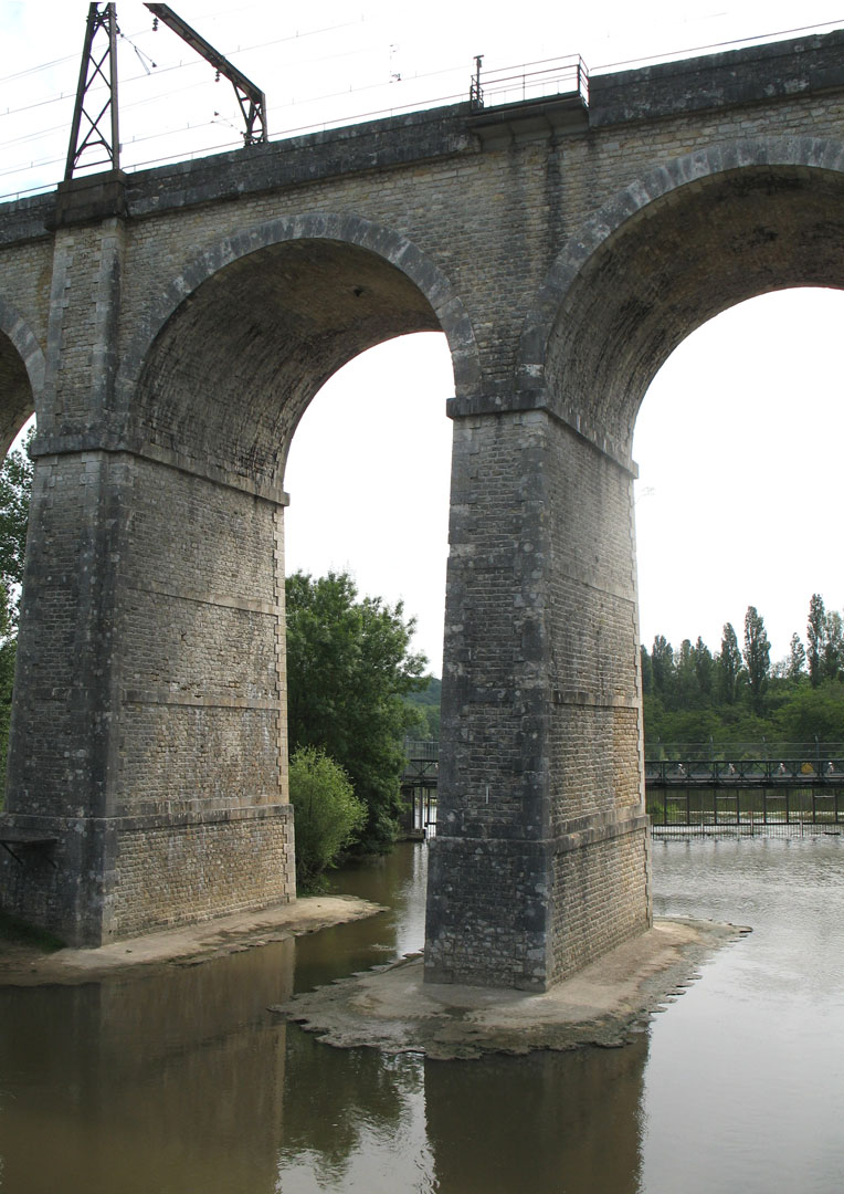 Monts, Le viaduc sur l'Indre, Indre-et-Loire, France